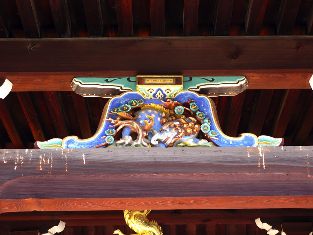 Kaeurmata at Kitano Tenmangū Japan 北野天満宮の蟇股（ 蛙股、かえるまた）